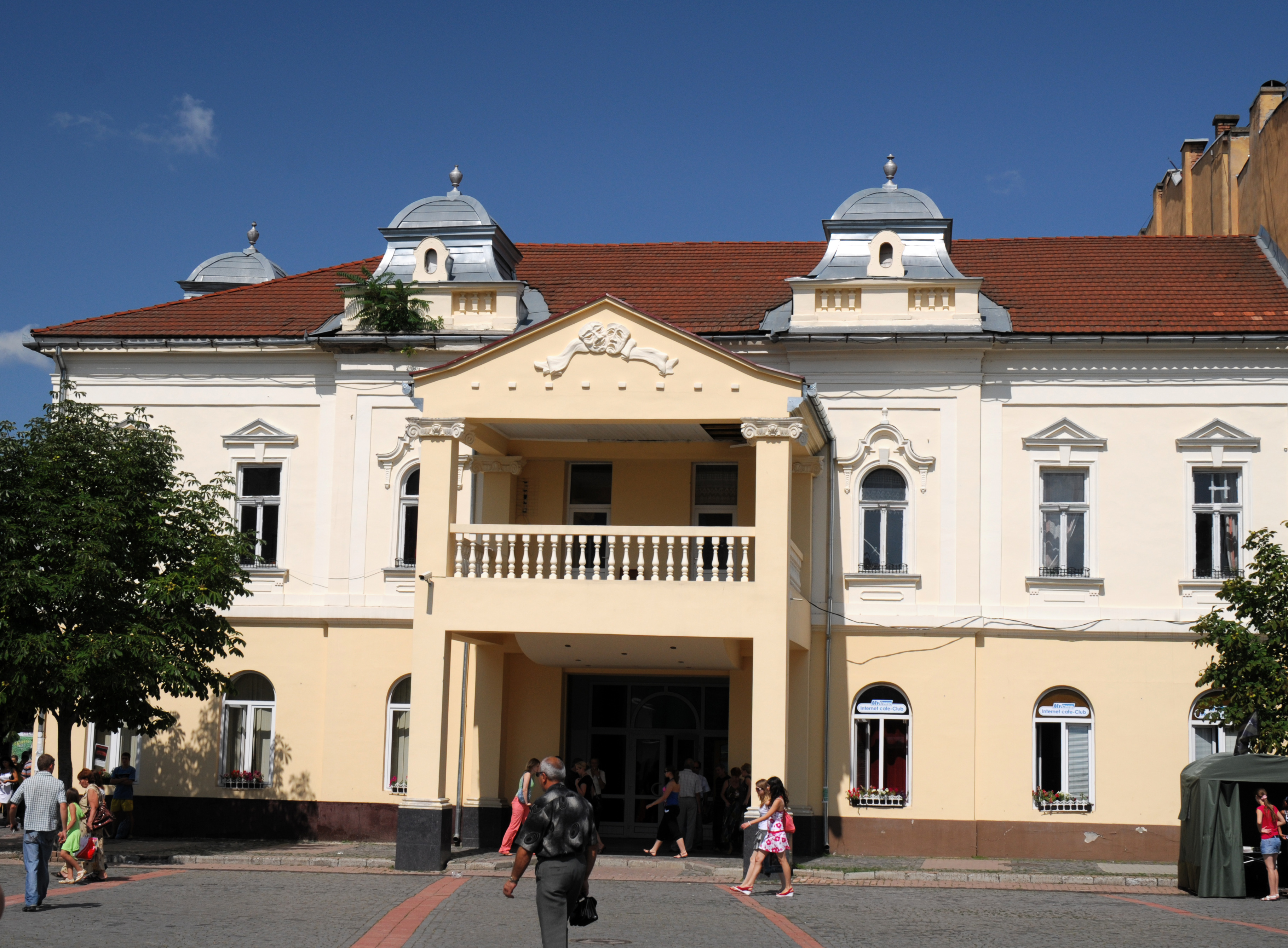 Будинок Мукачівського російського драматичного театру по вул. Грушевського, 2/1